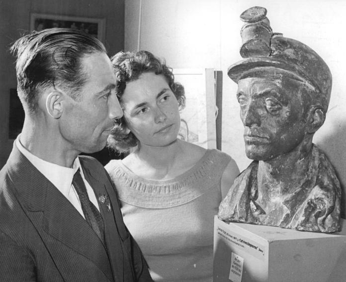 Zentralbild Hochneder-Krisch 9.6.1960 2. Arbeiterfestspiele des FDGB. Arbeiter besuchen die Kunstausstellung. Sehr aufgeschlossene und kritische Betrachter der in der Kunstausstellung des FDGB gezeigten Arbeiten von Berufs- und Laienschaffenden waren zahlreiche Werktätige, die an der Konferenz Schreibender Arbeiter anläßlich der Festspiele teilnehmen. UBz: Der Krempelausputzer Wolfgang Dörr aus Werdau und die Bibliothekarin Barbara Laube aus Zschopau betrachten die Porträtplastik "Kopf eines Bergmannes" von Gerhard Geyer, ausgezeichnet mit dem Kunstpreis des FDGB 1960